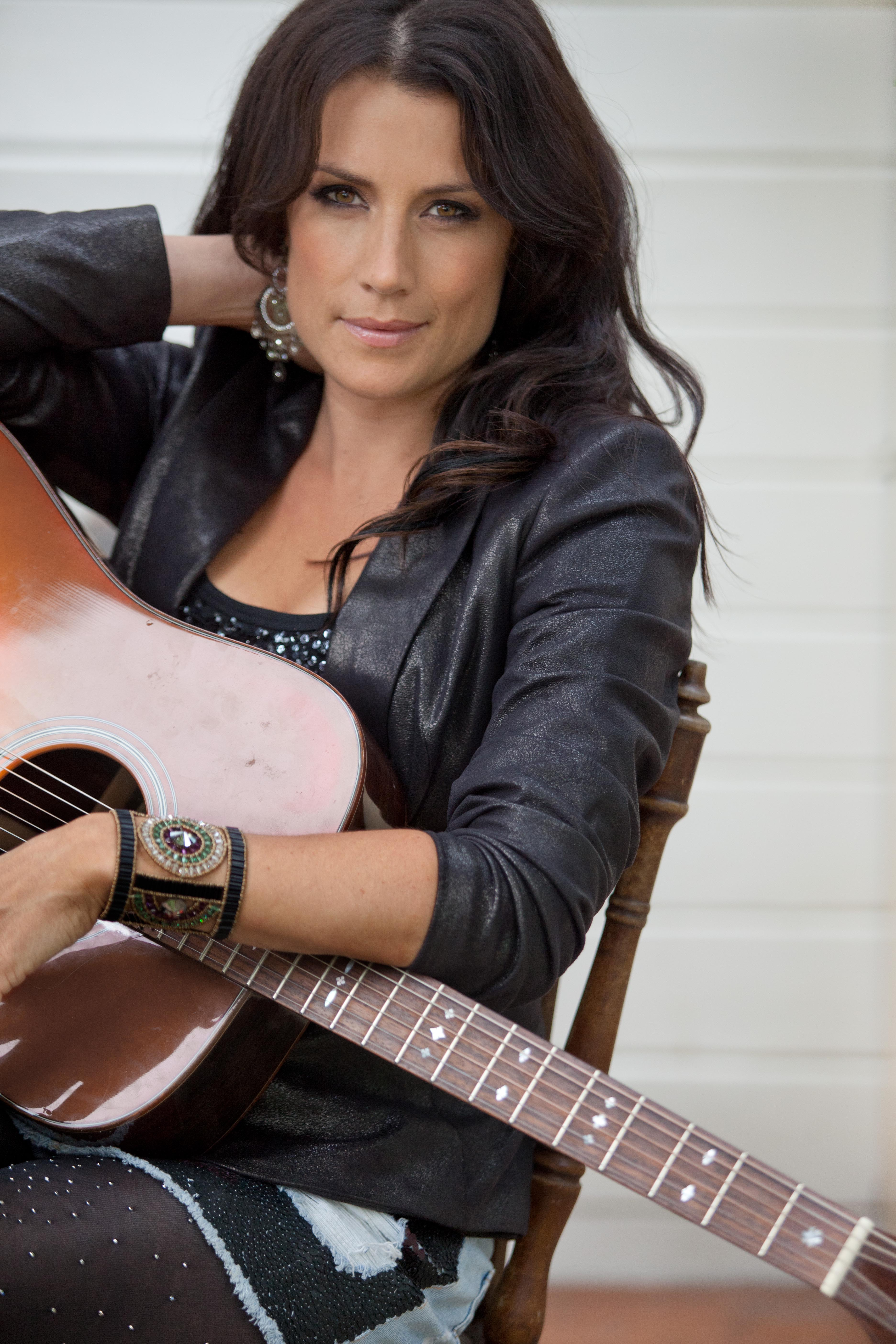 Artisten Jill Johnson.